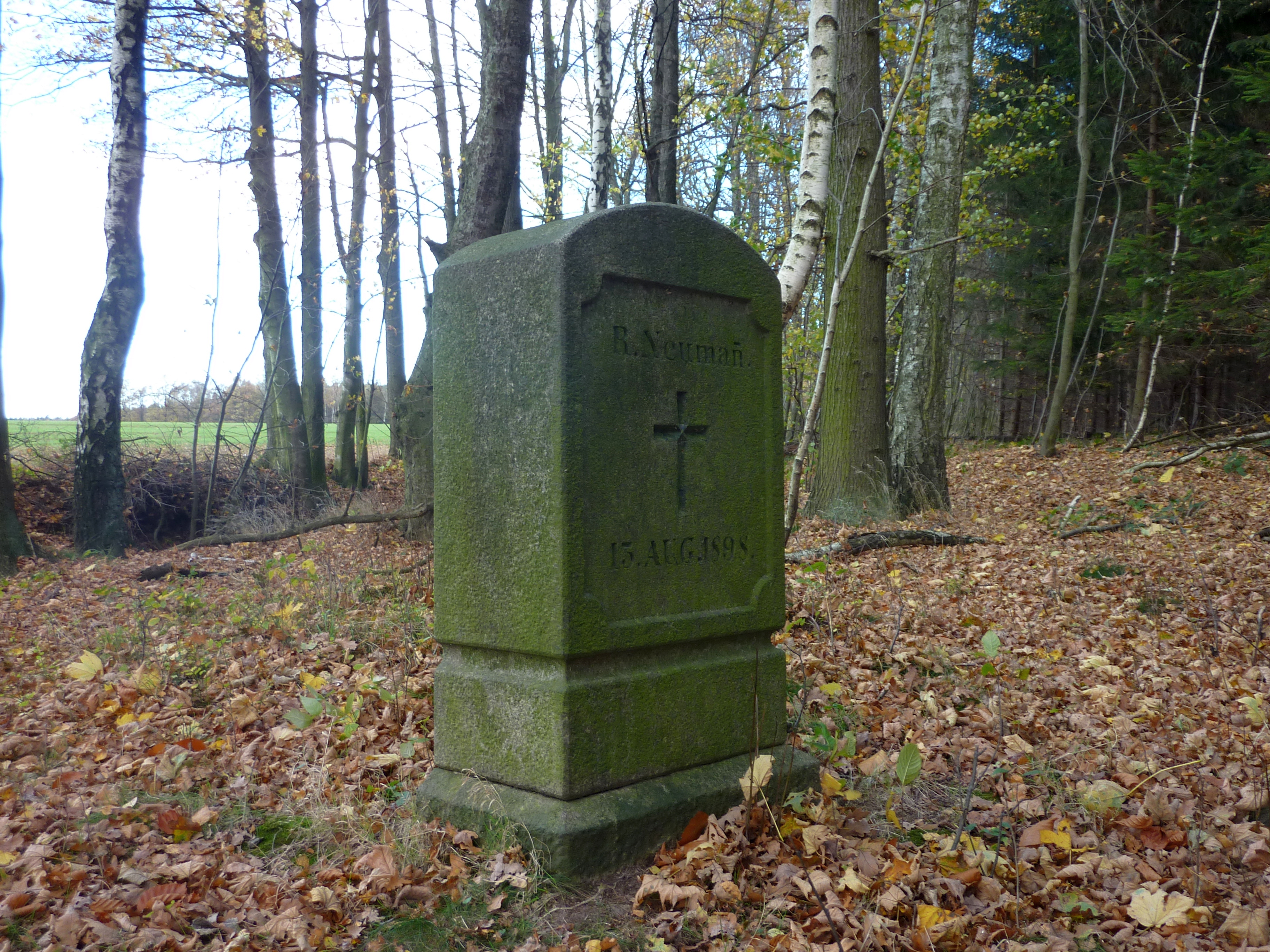 Gedenkstein für den an dieser Stelle 1898 ums Leben gekommenen Heinrich Richard Neumann